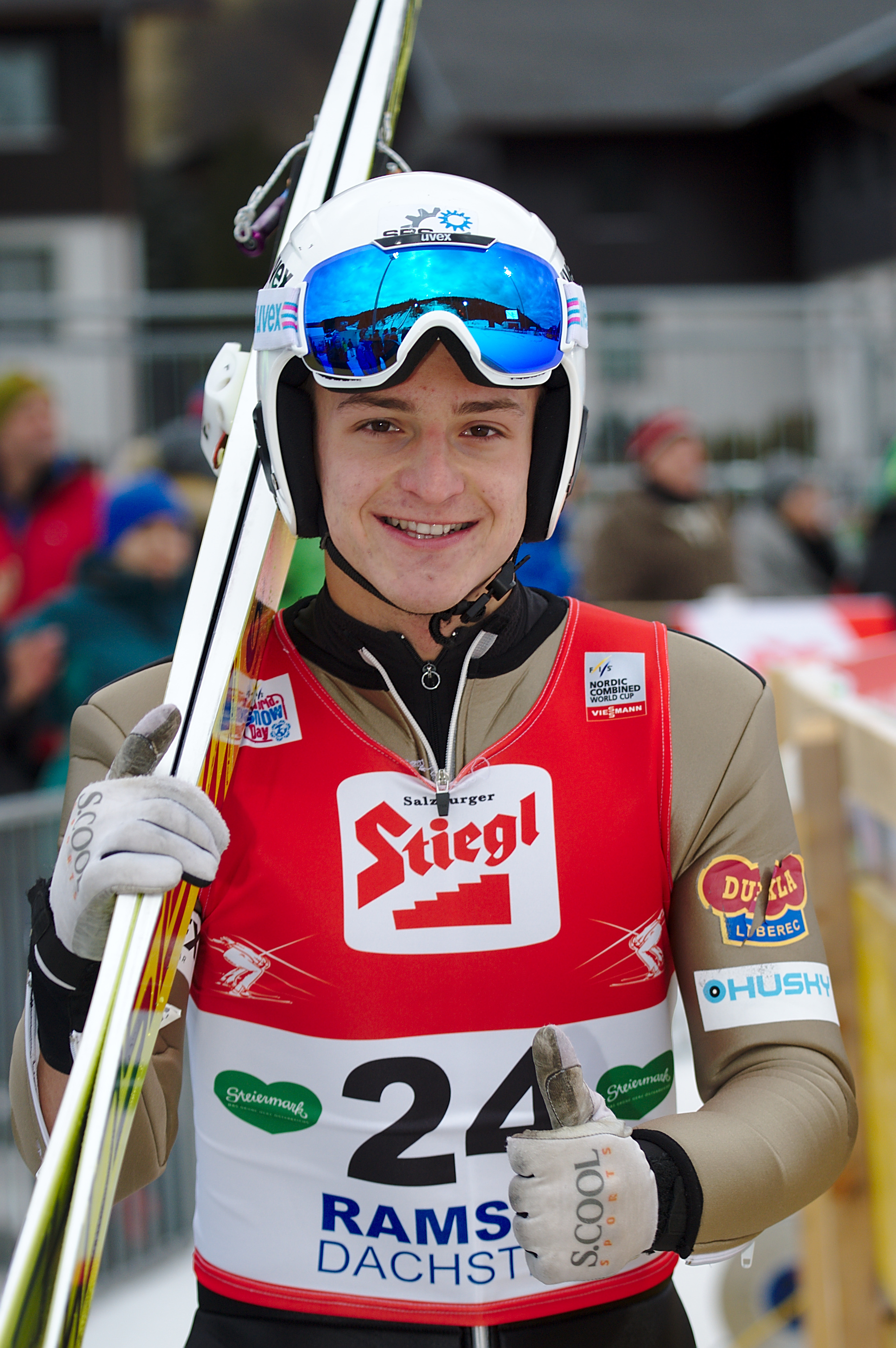 Tomas Portyk (CZE)